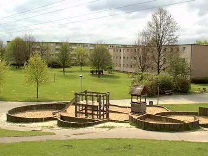 Donaupark mit Spielplatz in der Weststadt, Braunschweig (2011 abgerissen)